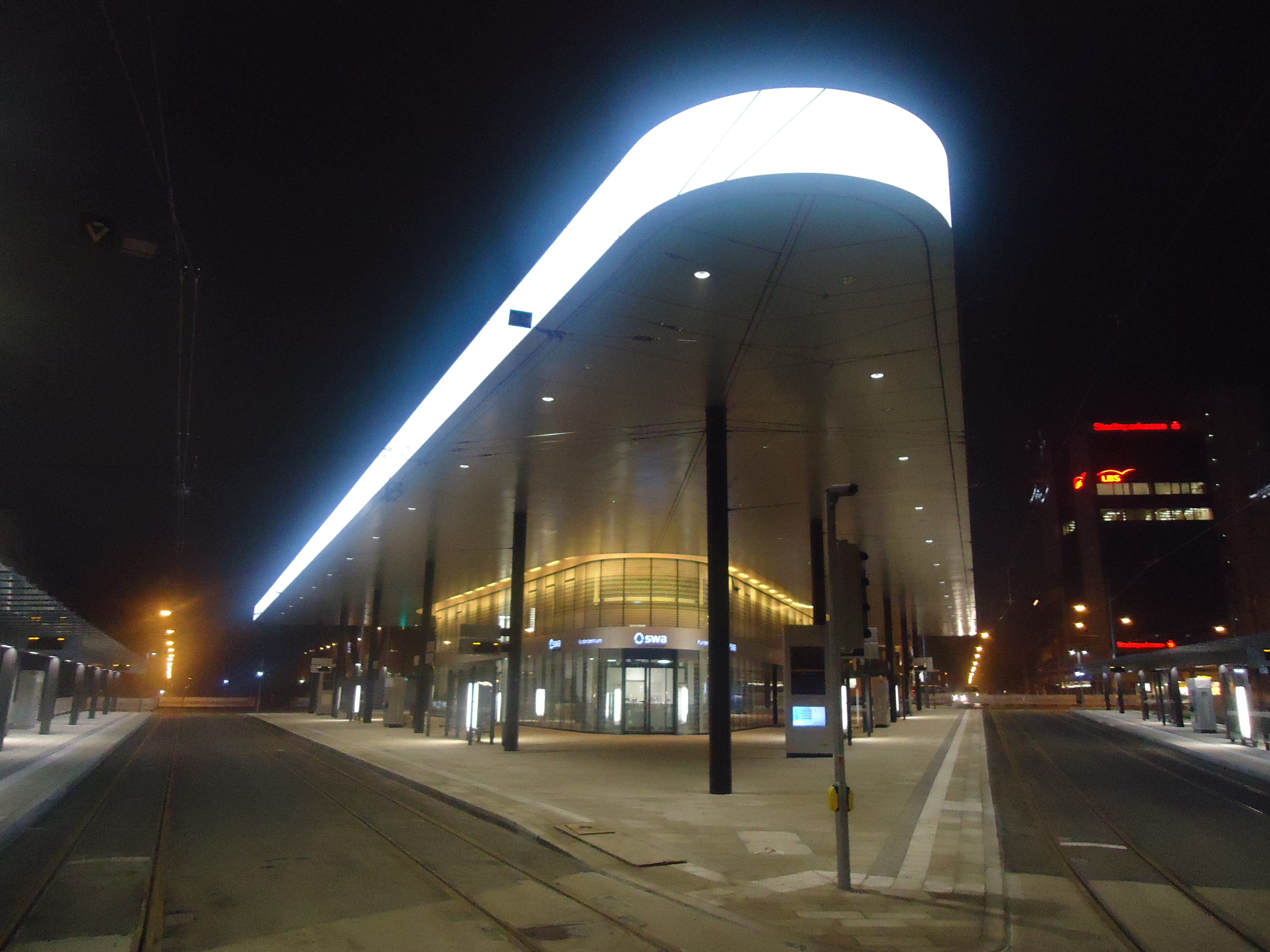 Augsburger Königsplatz 2013 bei Nacht (Freitag vor Eröffnung)